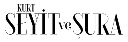 Logo de la serie de televisión Kurt Seyit ve Sura